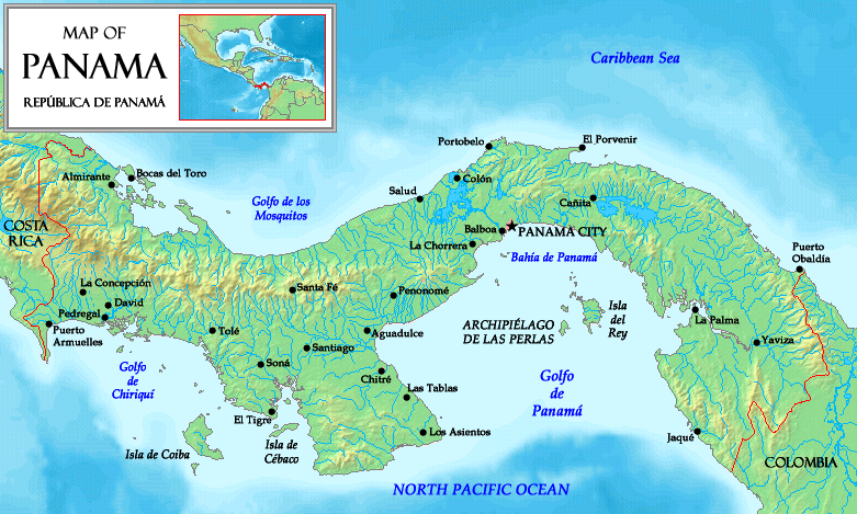 A map of Panama